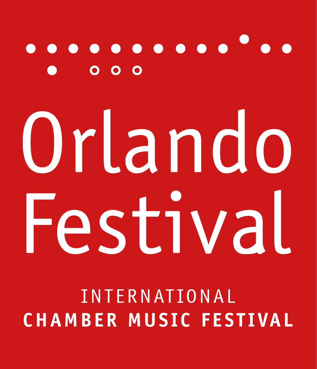 Orlando Festival logo [ENG]